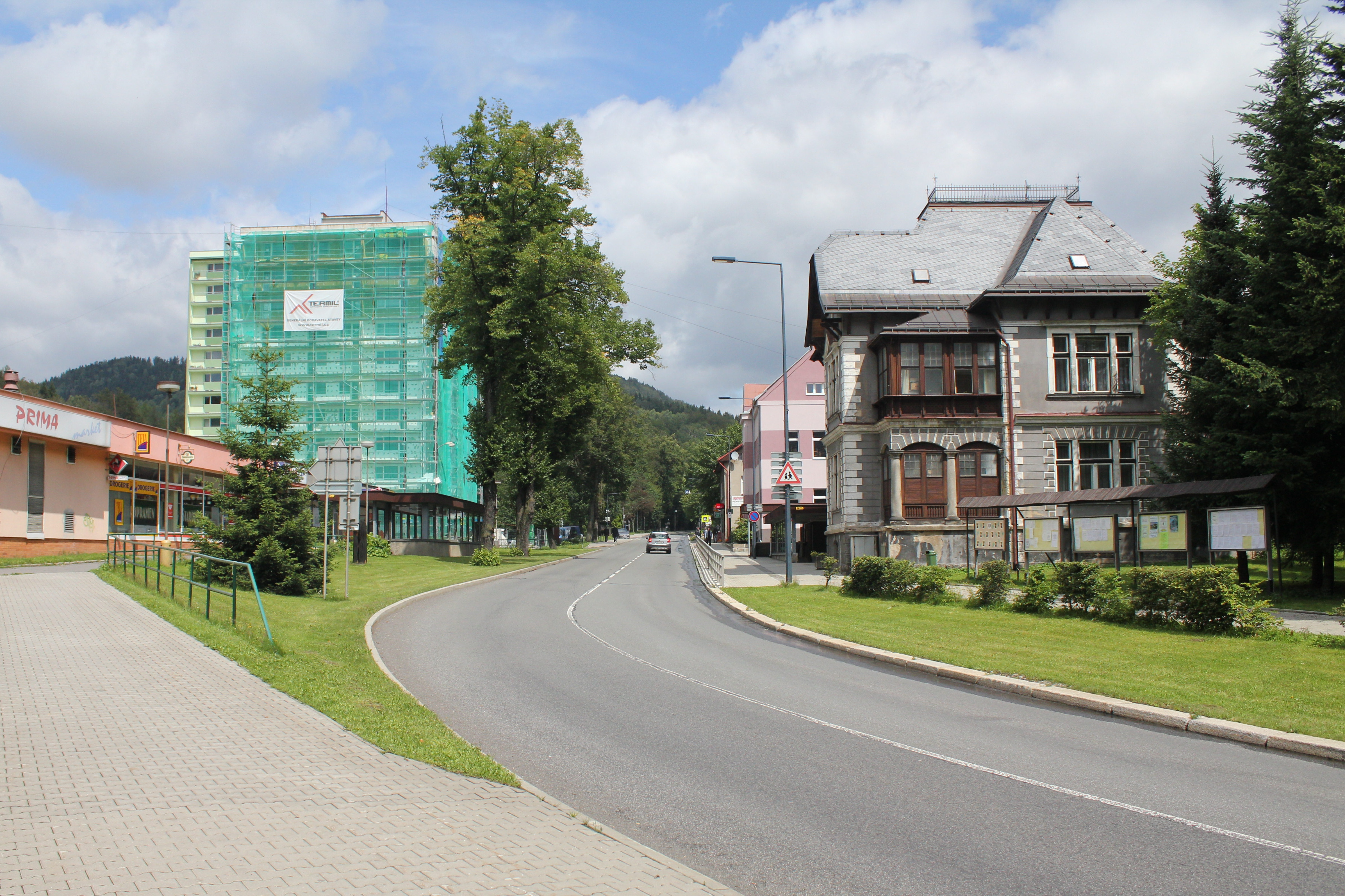 Desná